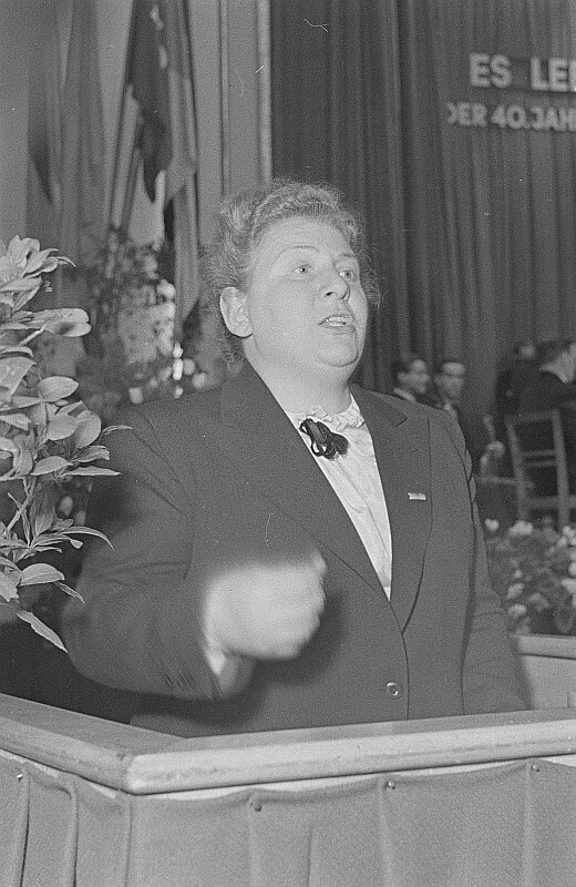 Original image description from the Deutsche Fotothek Portrait Elli Schmidts am Rednerpult